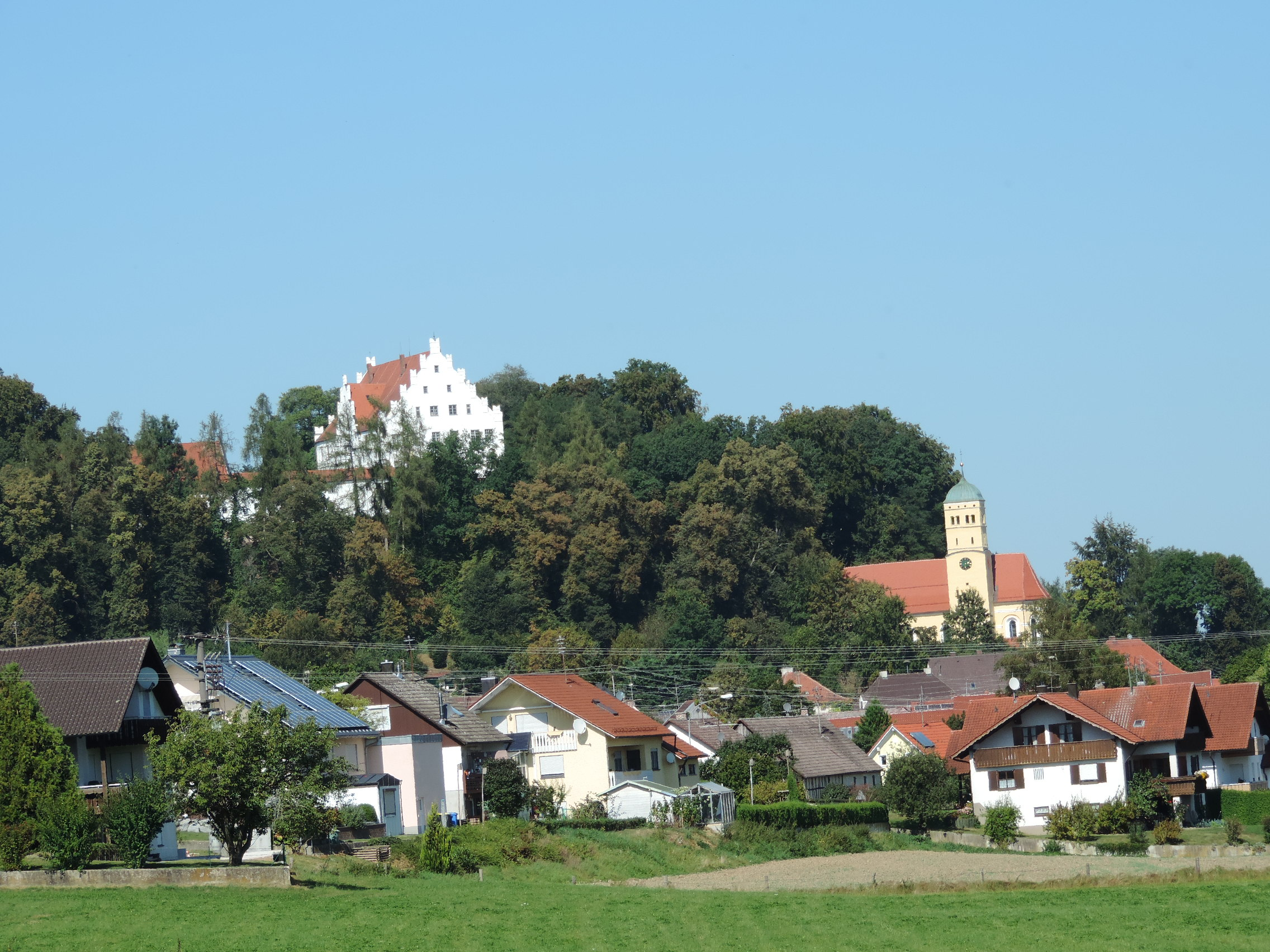 Blick auf Schloss und Pfarrkirche